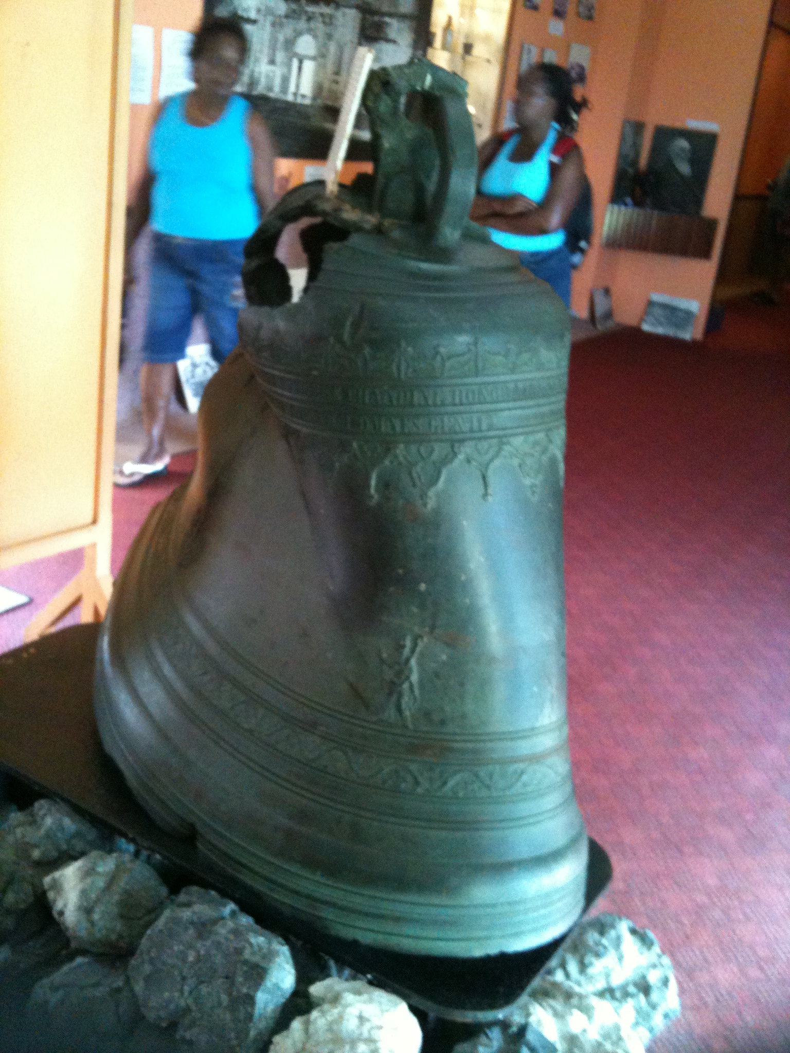 Bourdon de la cathédrale de Saint-Pierre, en fonte, déformée suite à l'éruption volcanique de 1902, visible au musée Frank Arnold Perret (cloche).